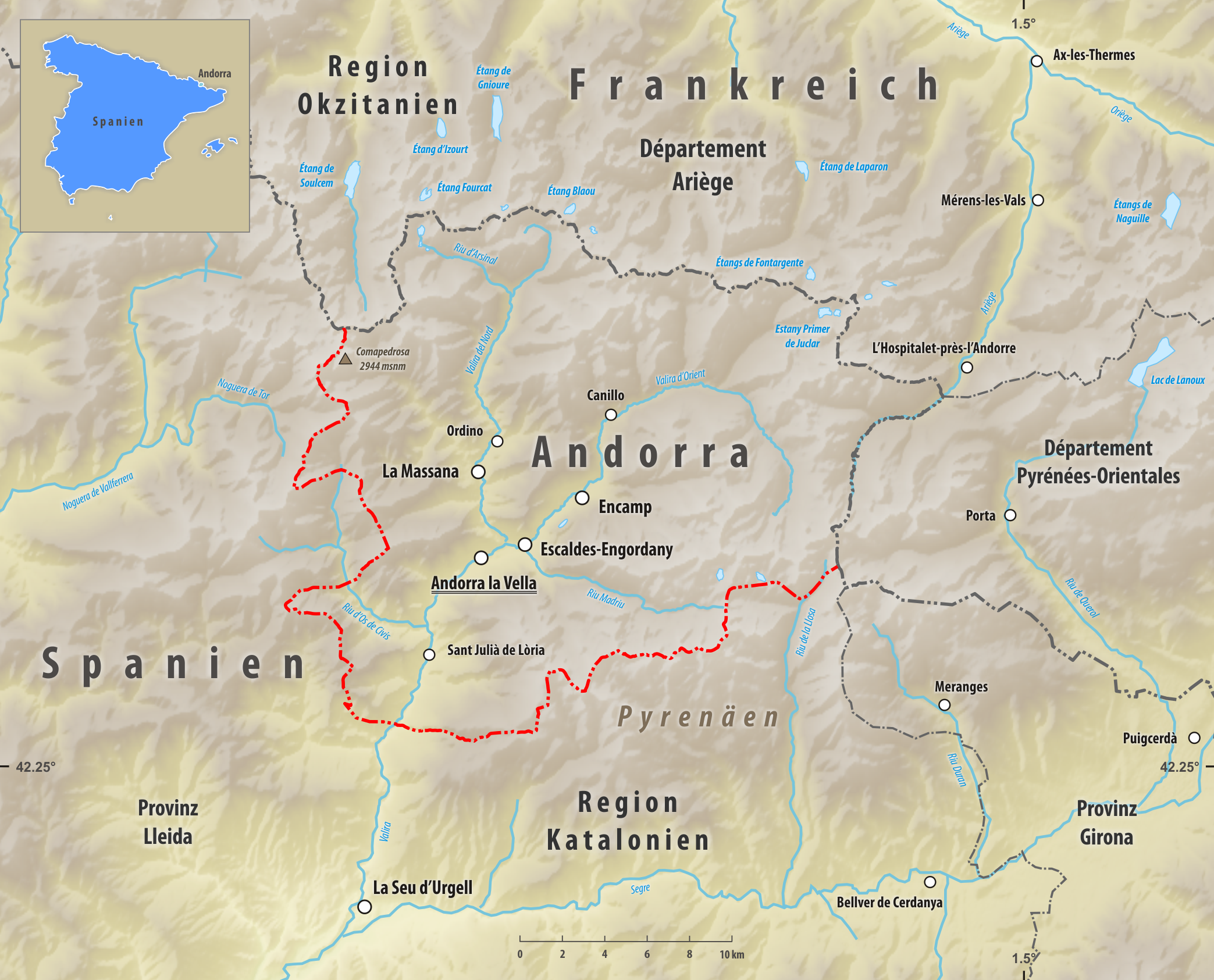 Reliefkarte des Grenzverlaufes zwischen Andorra und Spanien Topographischer Hintergrund: NASA Shuttle Radar Topography Mission (public domain). SRTM3 v.2.